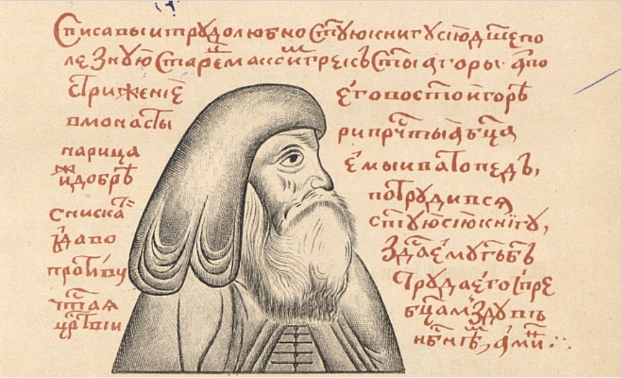 Изображение из рукописи, помещенное в первом печатном издании сочинений прп. Максима Грека издания 1859 года.